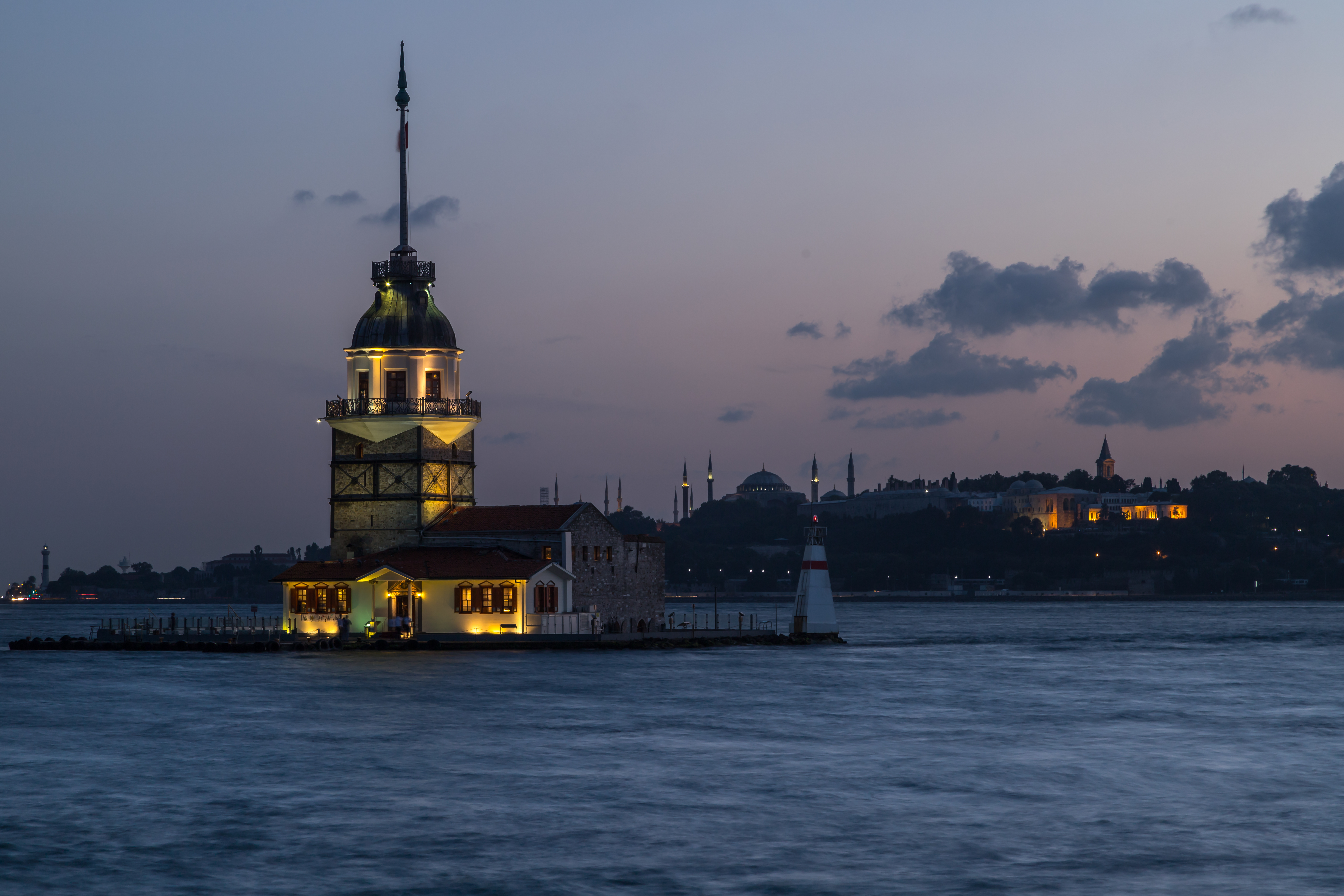 Torre di Leandro (Istanbul), ultime luci